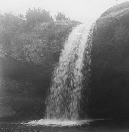 Imatge